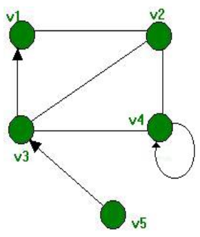 Grafo para el estudio de una matriz sobre el.